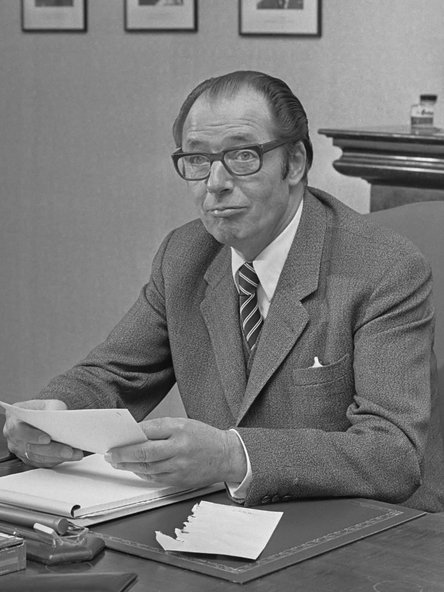 Kabinetsformateur M. Ruppert in zijn werkkamer 5 december 1972